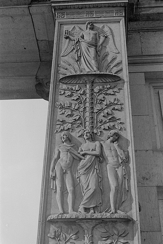 Original image description from the Deutsche Fotothek Reliefs am Schinkeltor